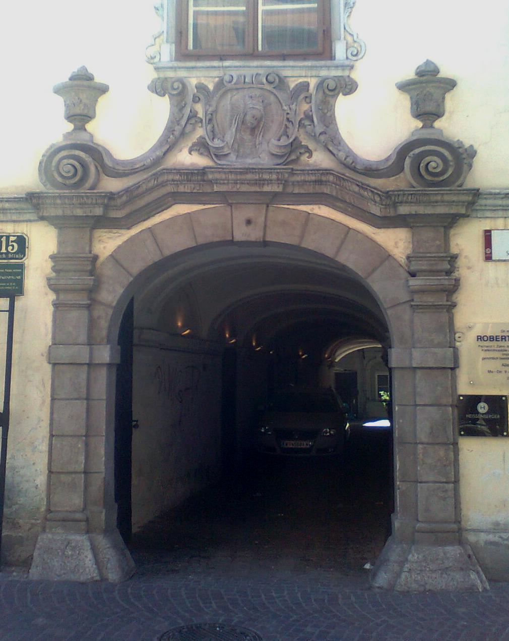 Portal des Grazer Witwenpalais